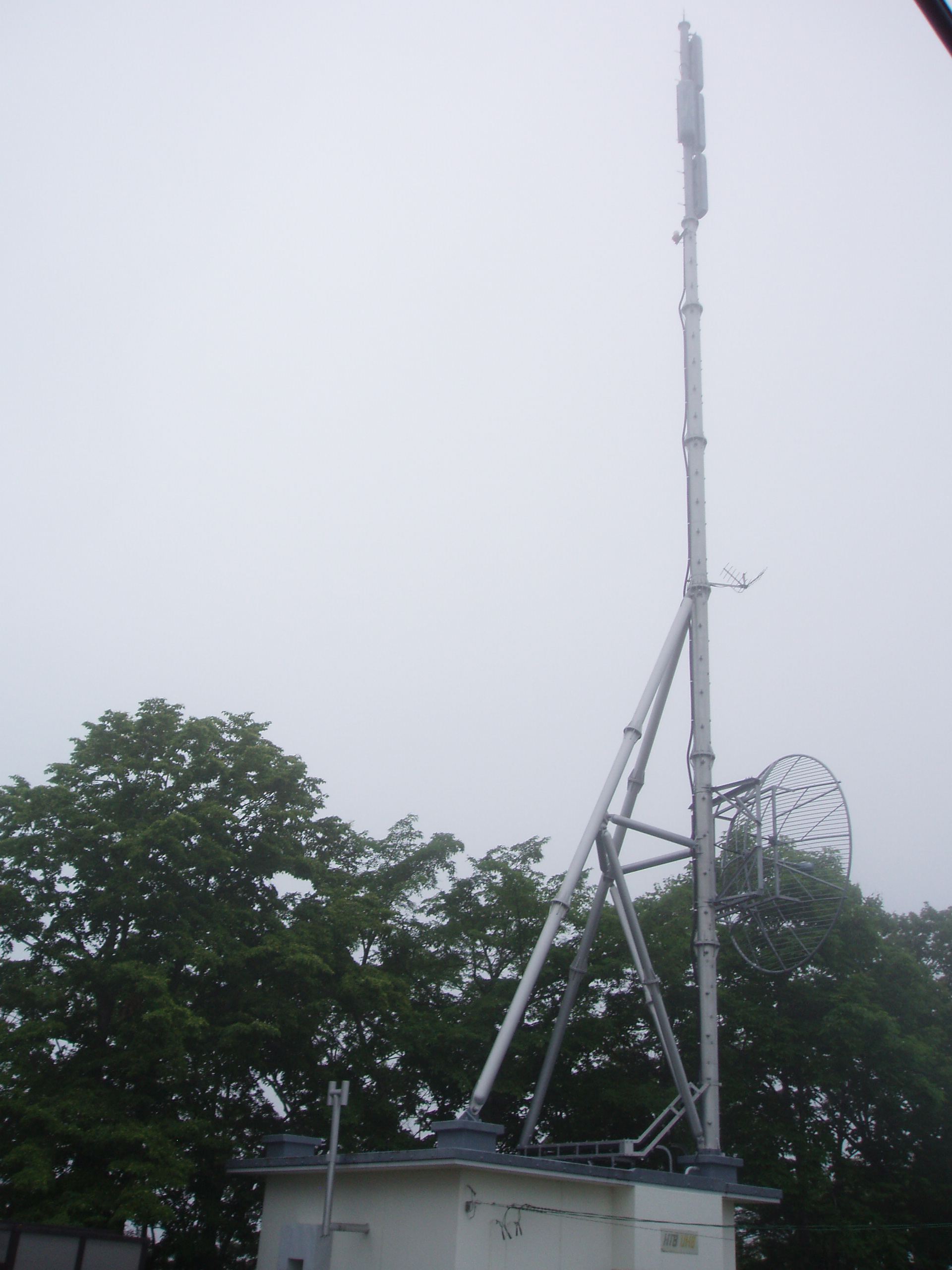 広尾中継局 HTB・UHB送信設備